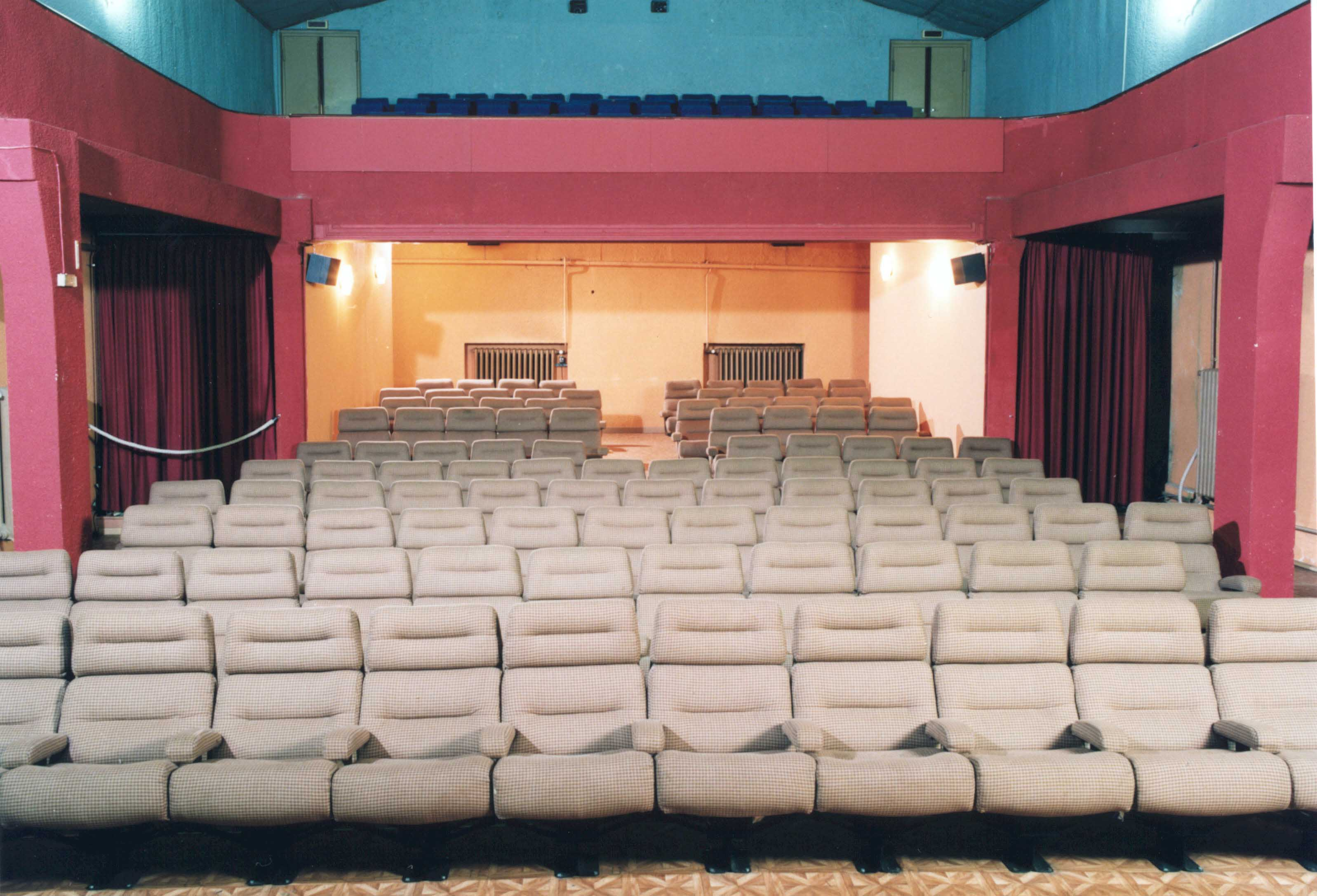 Kursaal - Sall